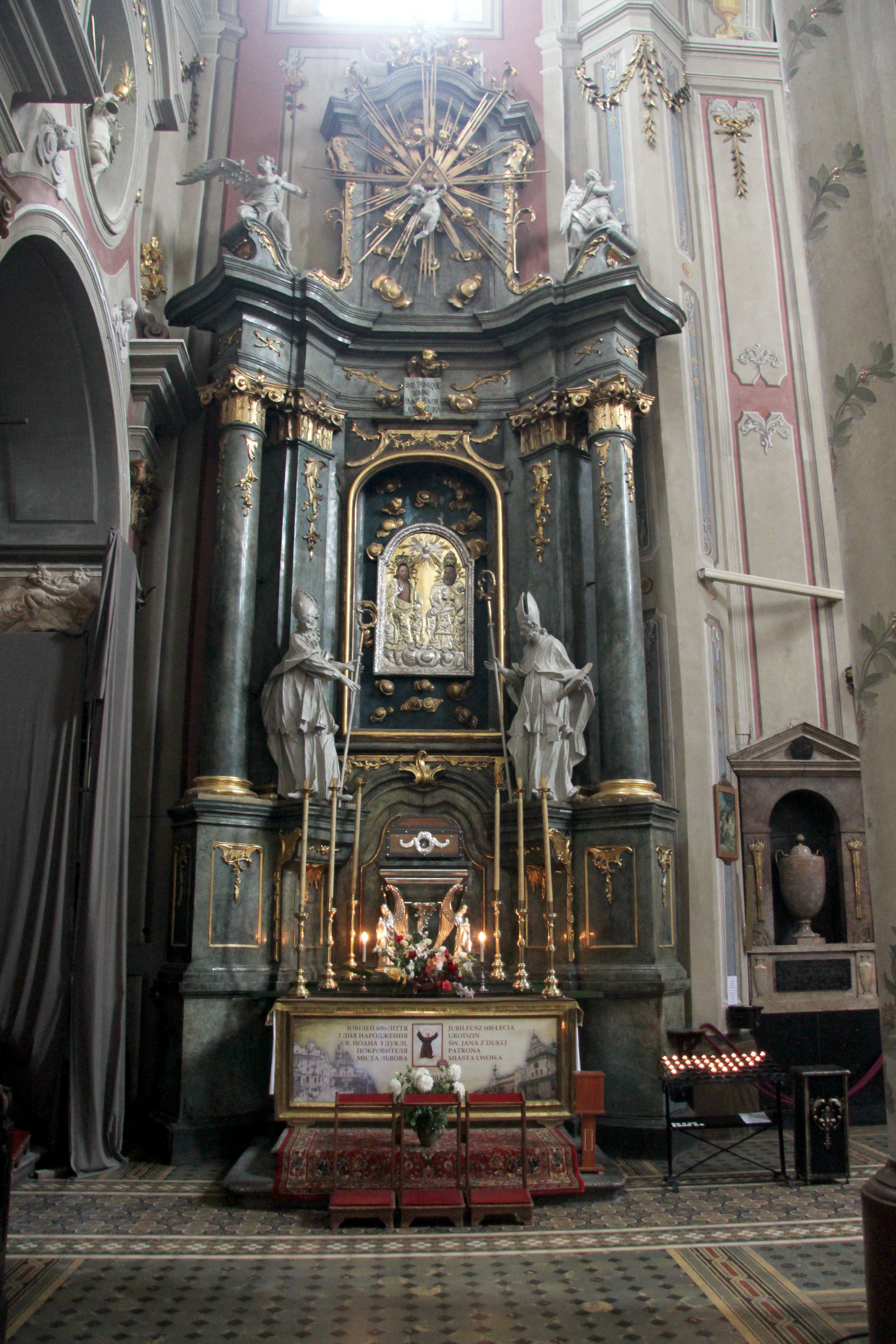 Вівтар Пресвятої Трійці з єпископами Св. Миколаєм та Атанасієм, собор Кафедральний, Катедральна пл., 1, Львів